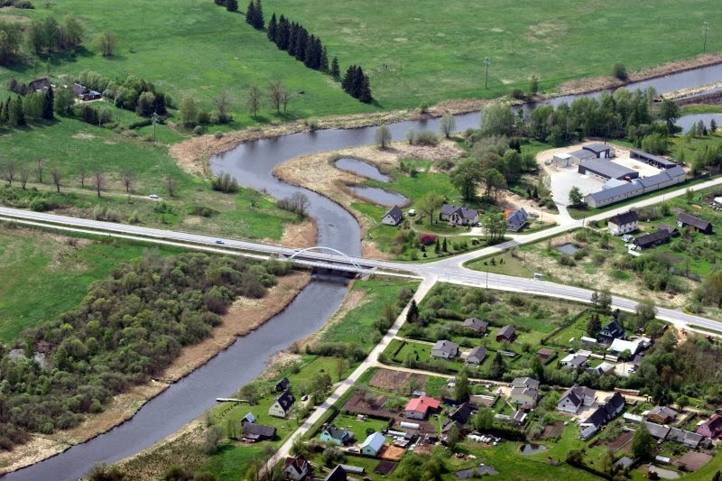 Kirumpää sild üle Võhandu jõe